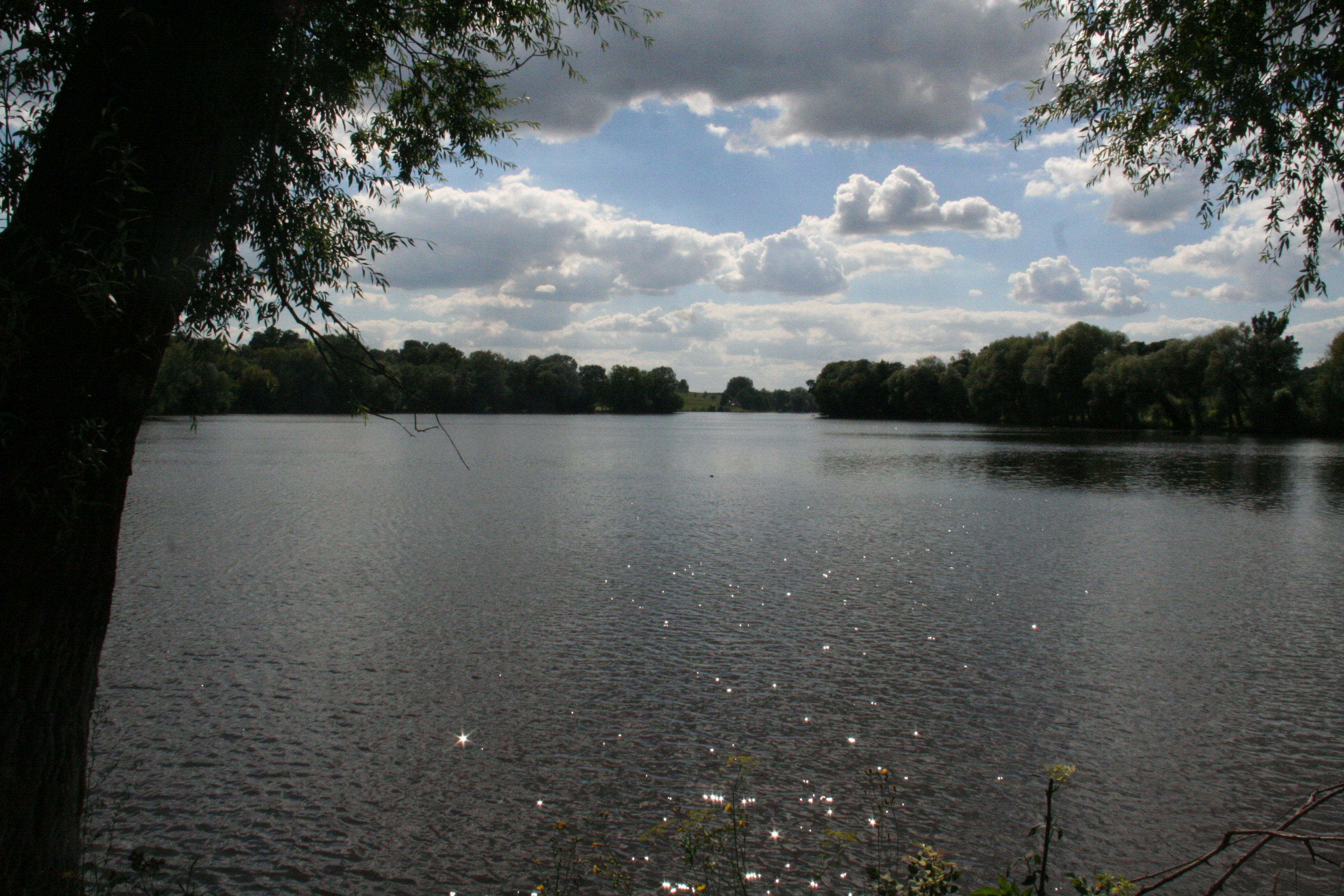 "Панський став", викопаний на поч.ХХст. власником села Анциферовим.